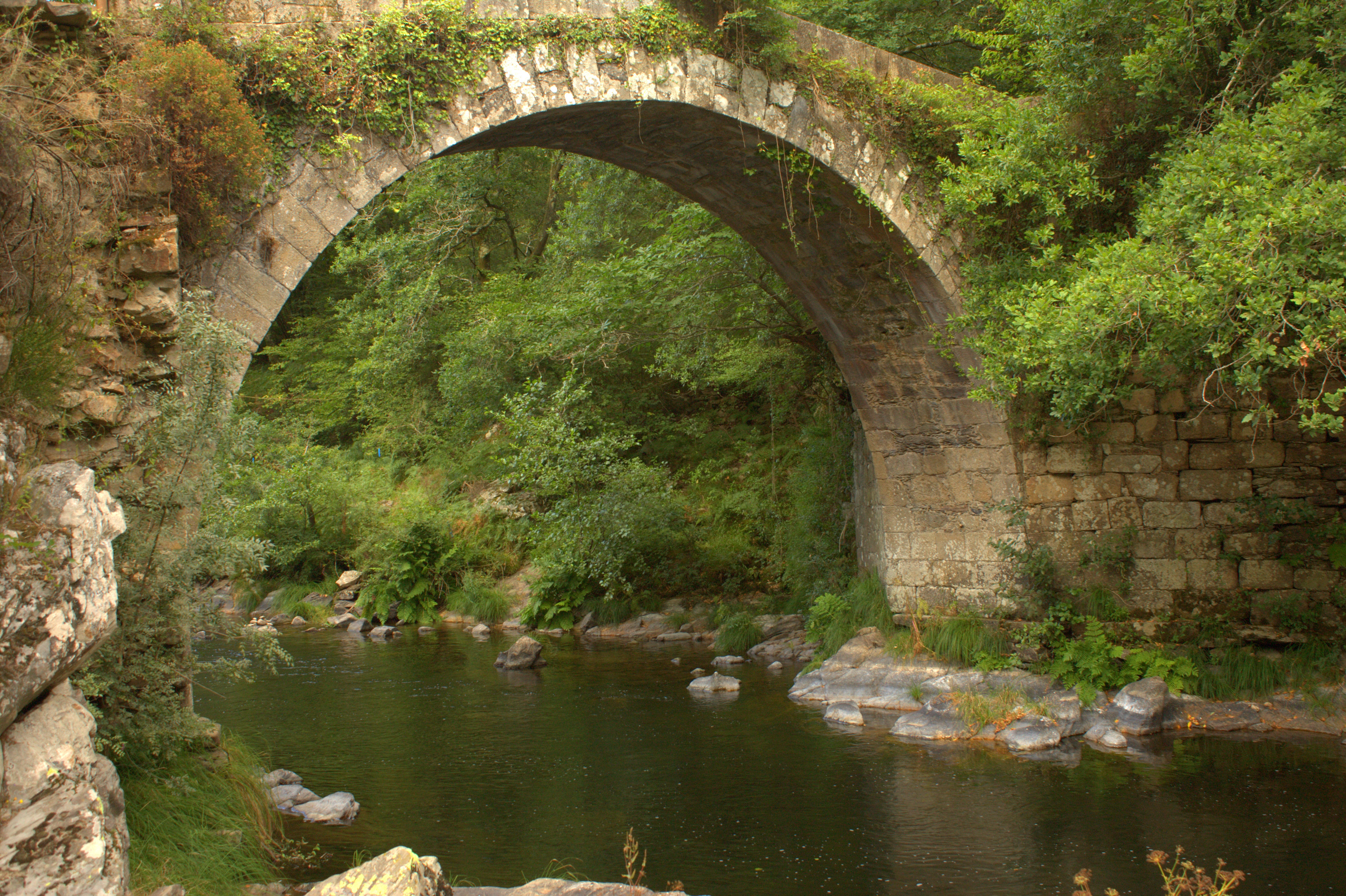 Puente sobre el río Deza, Galicia, España.